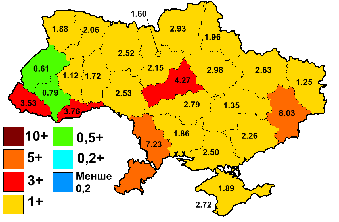 Результат Соціалістичної партії України за областями на виборах 2007 року